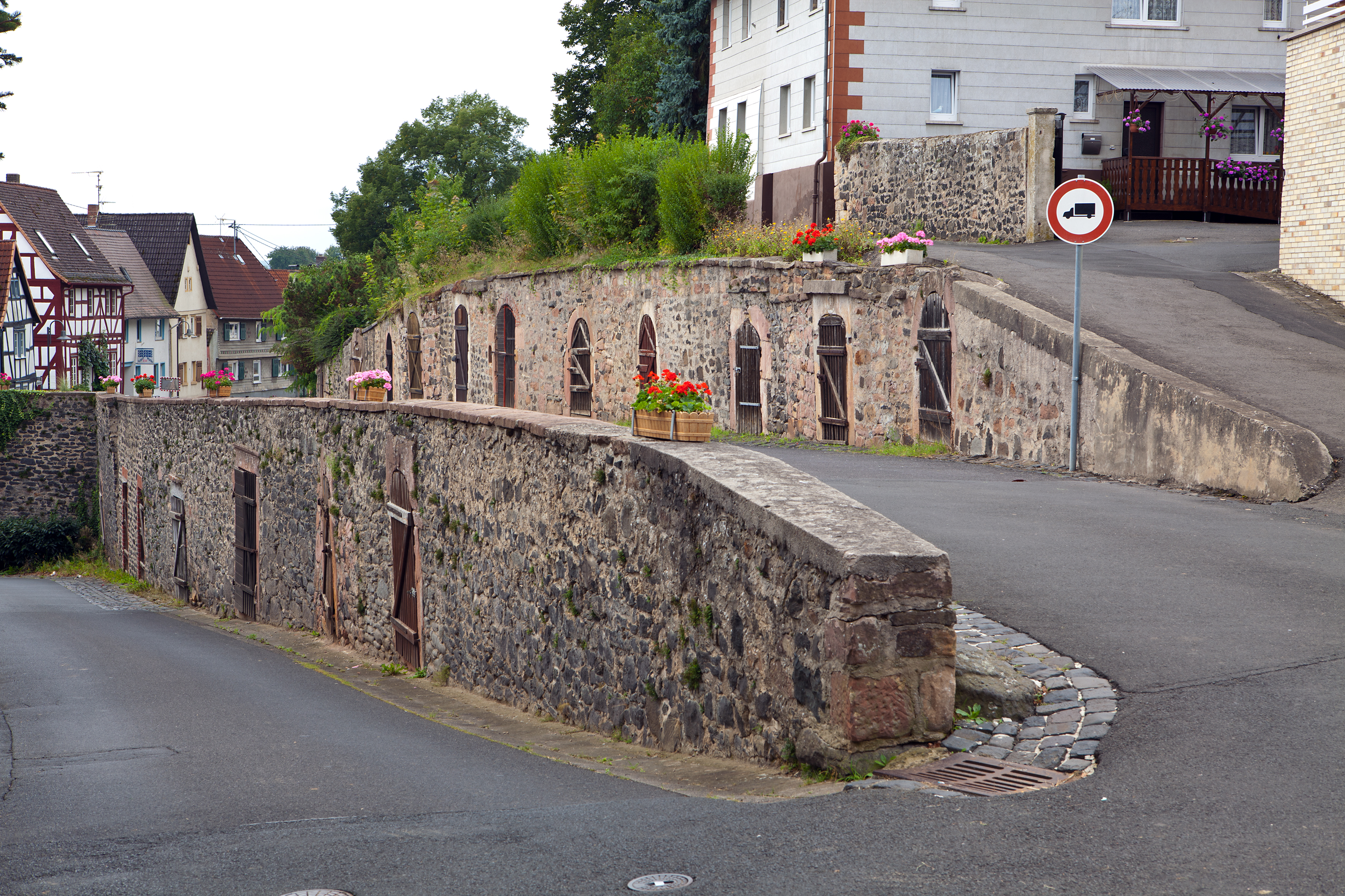 Eingänge zu den Felsenkeller unter der evangelischen Kirche in Ranstadt, Ortsteil Dauernheim.